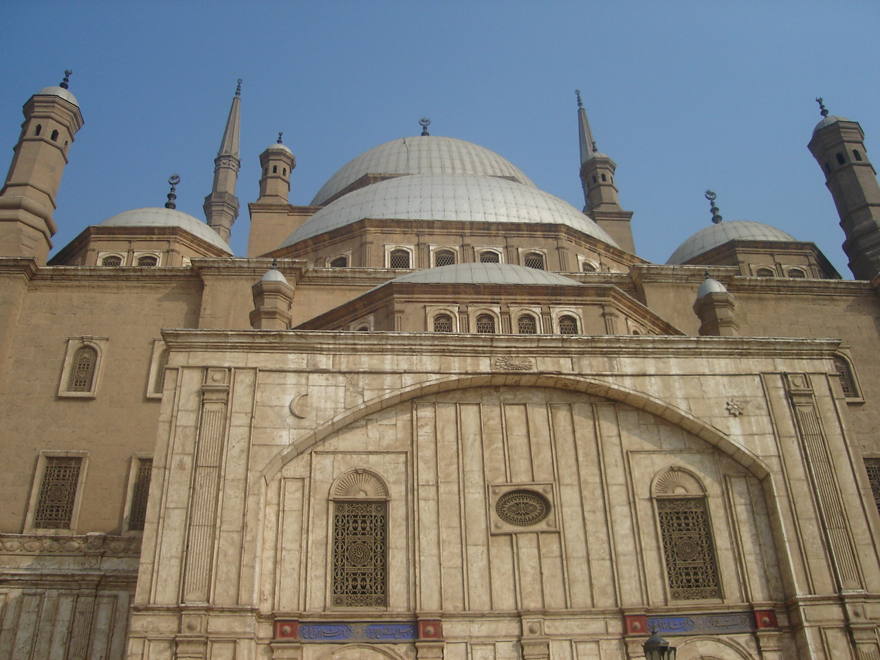 Immagine dall'Egitto - Moschea di alabastro (Mohammed-Ali-Basha Mosque)